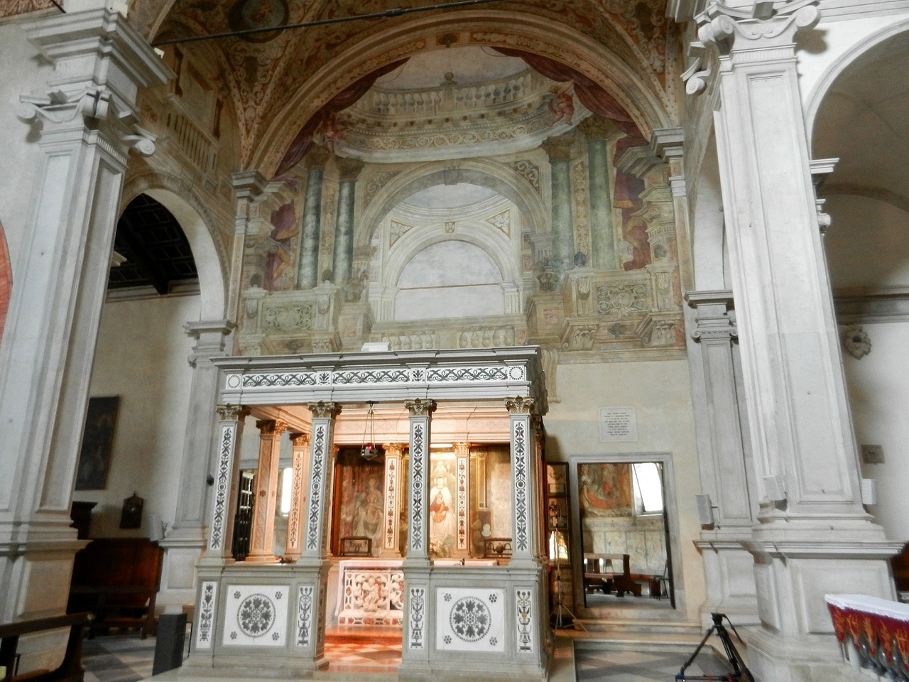 Treviso - Tempietto con l'affresco della Madonna Grande all'interno della Chiesa di S. Maria Maggiore